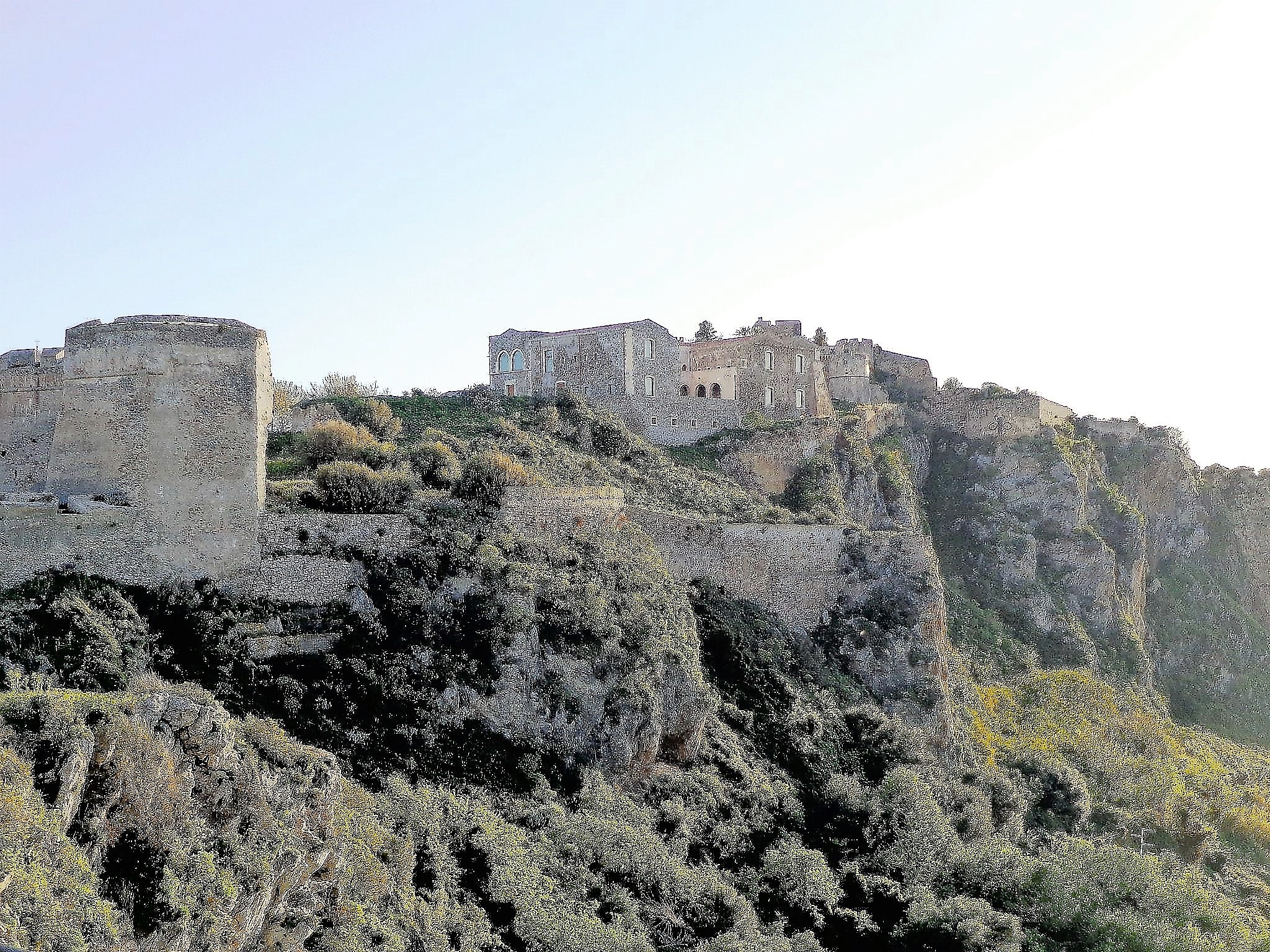 Fortificazioni, monastero delle Benedettine e Scarabeo. Foto d'archivio. Scatto già presente su Facebook e altre pagine personali.